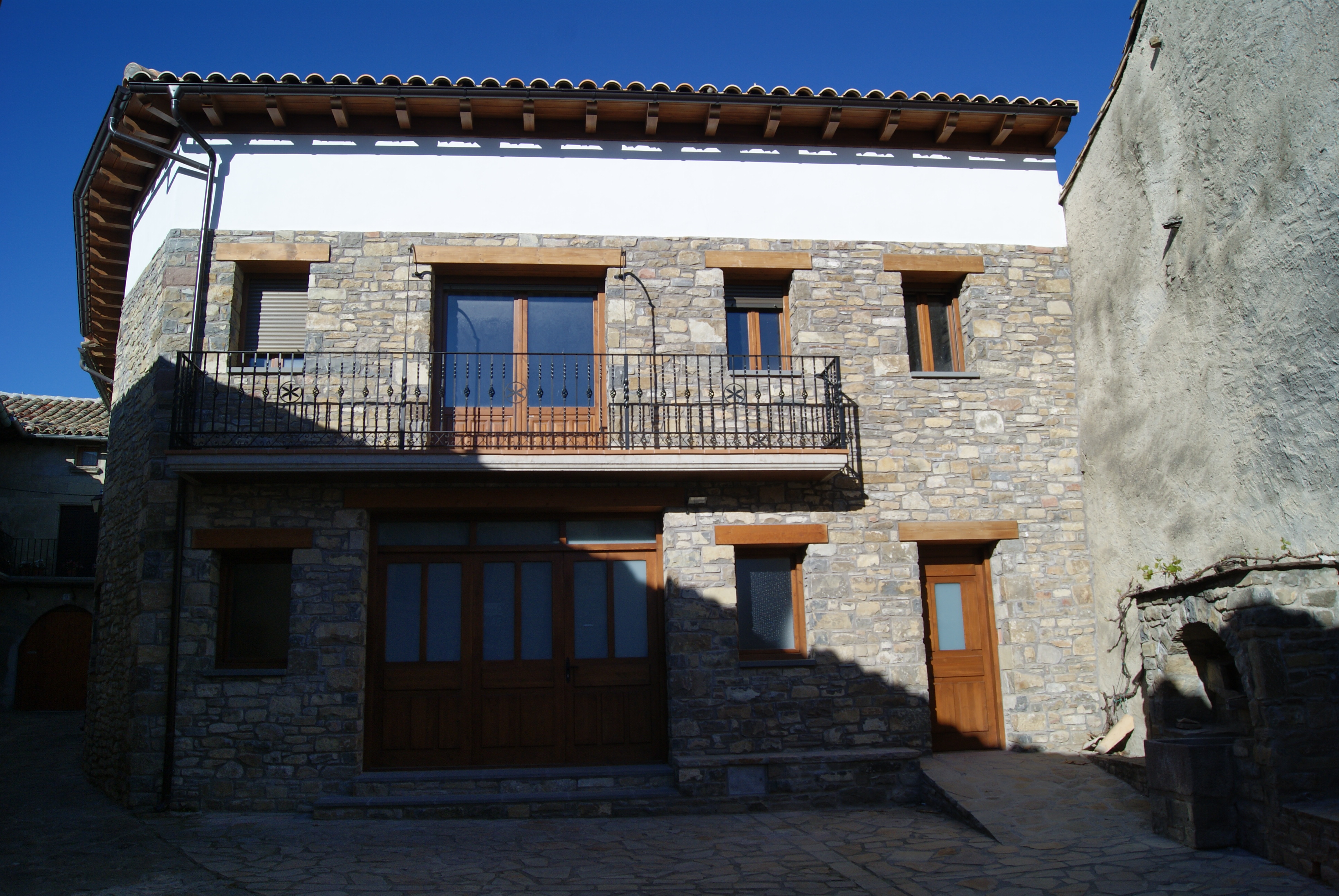 Artieda (Zaragoza)